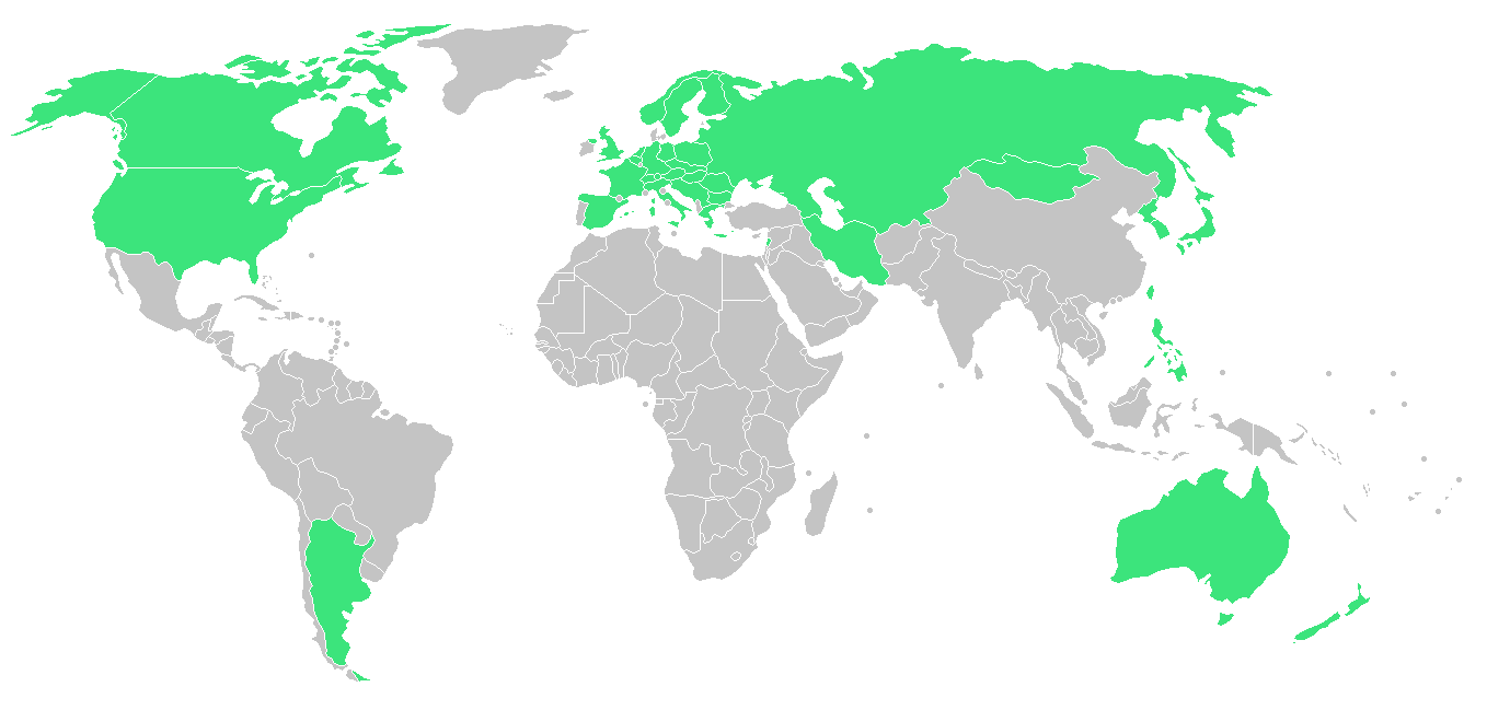 Carte des nations participantes aux Jeux olympiques d'hiver de 1972 à Sapporo.